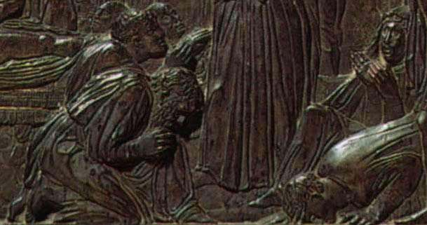 Donatello, miracolo del cuore dell'avaro, dettaglio 4